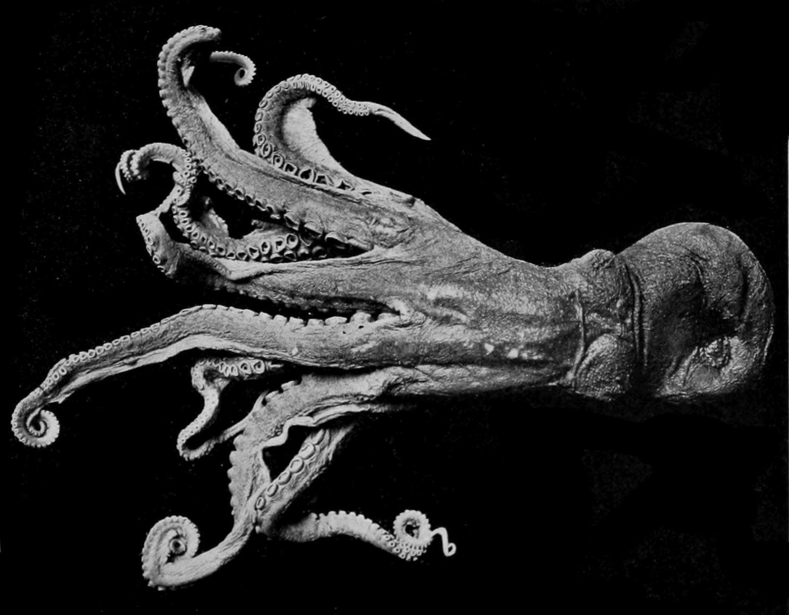 Enteroctopus dofleini